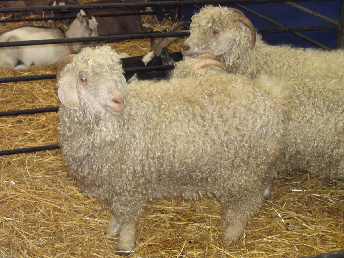 Angorageiten. Zelfgemaakte foto.